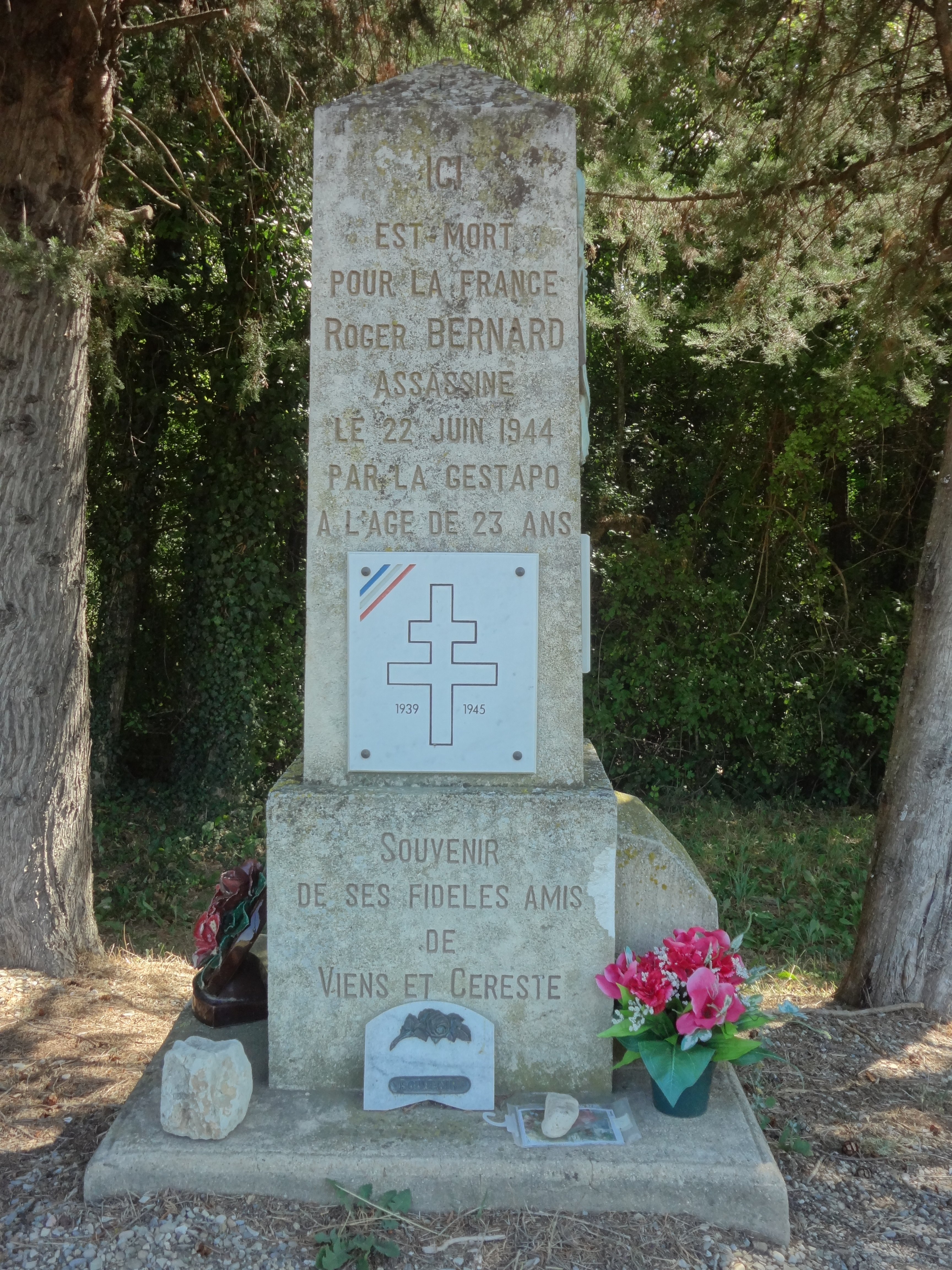 Stèle au poète résistant Roger Bernard, sur le lieu de sa mort, fusillé lors d'une mission de liaison car armé. L'auteur allemand Curd Ochwadt a fait poser, avec l'accord des Résistants locaux, dont René Char, une petite stèle sur le côté.